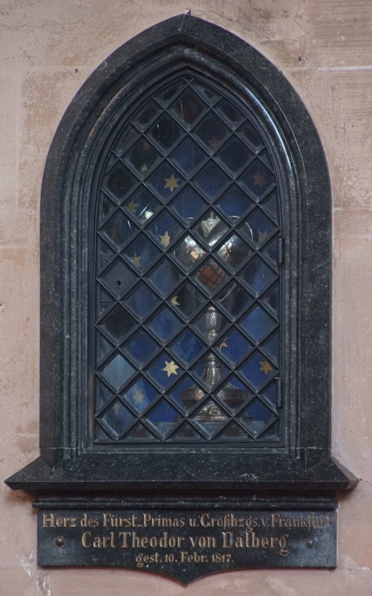 Herz des Carl Theodor von Dalberg in der Stiftsbasilika St. Peter und Alexander (Aschaffenburg)